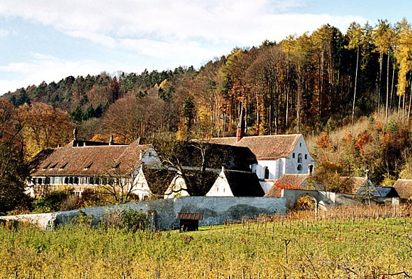 Die Kartause Ittingen Foto: Roland Zumbühl, November 2000